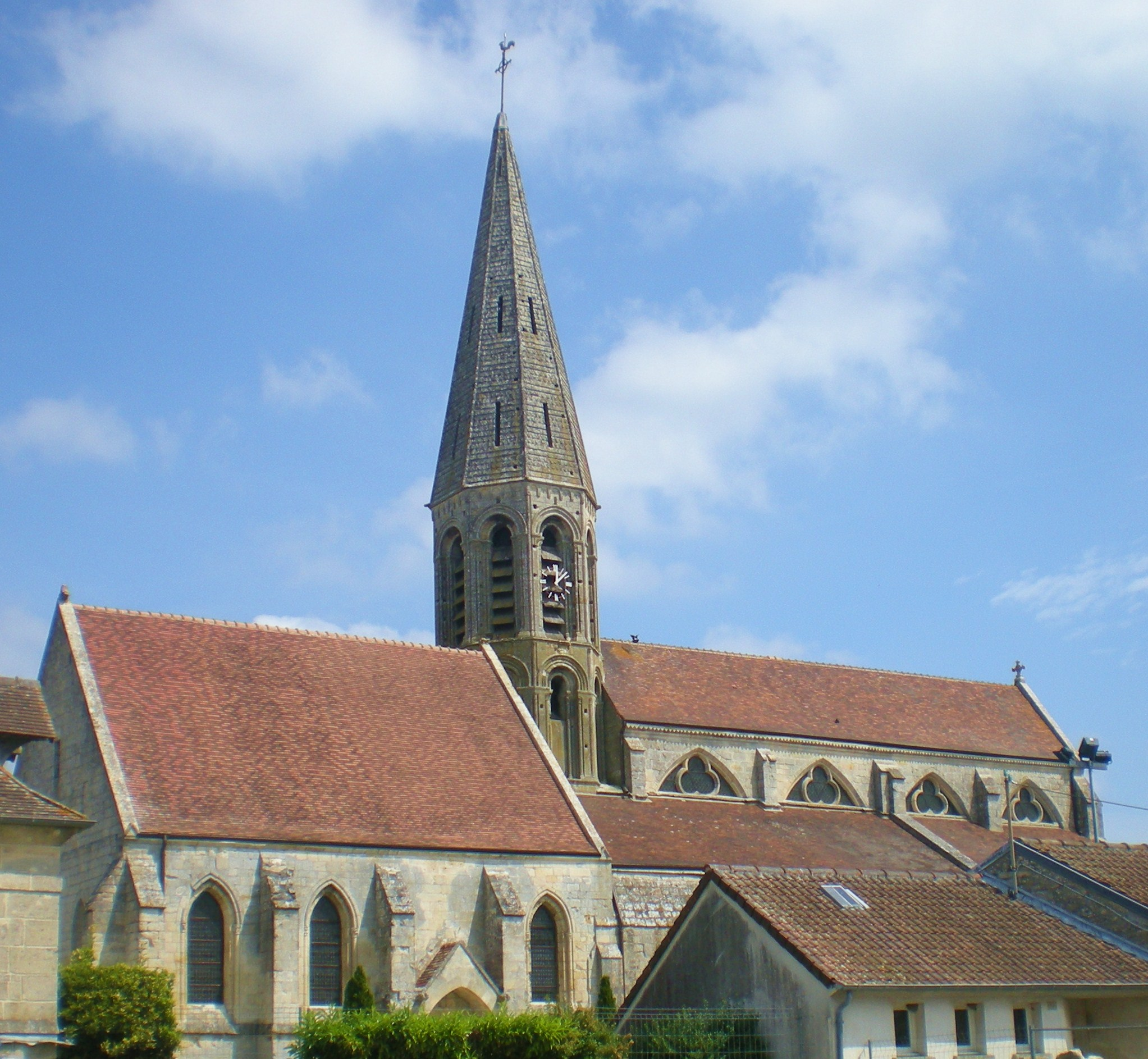 Église Saint-Étienne de Cambronne-lès-Clermont